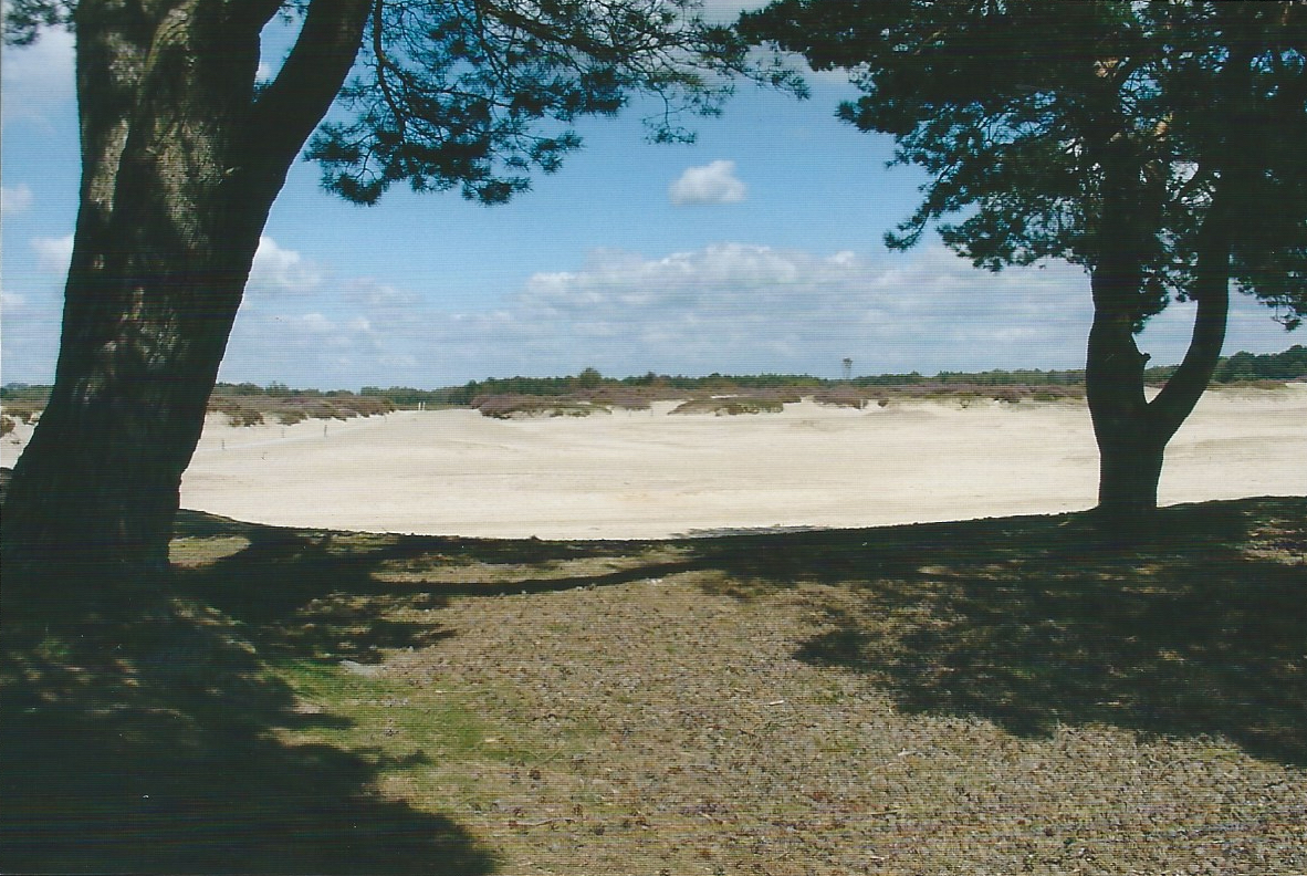 Balloërveld - Zandverstuiving. Balloërveld in de gemeente Aa en Hunze. Licensing Categorie:Afbeelding Balloërveld Categorie:Aa en Hunze